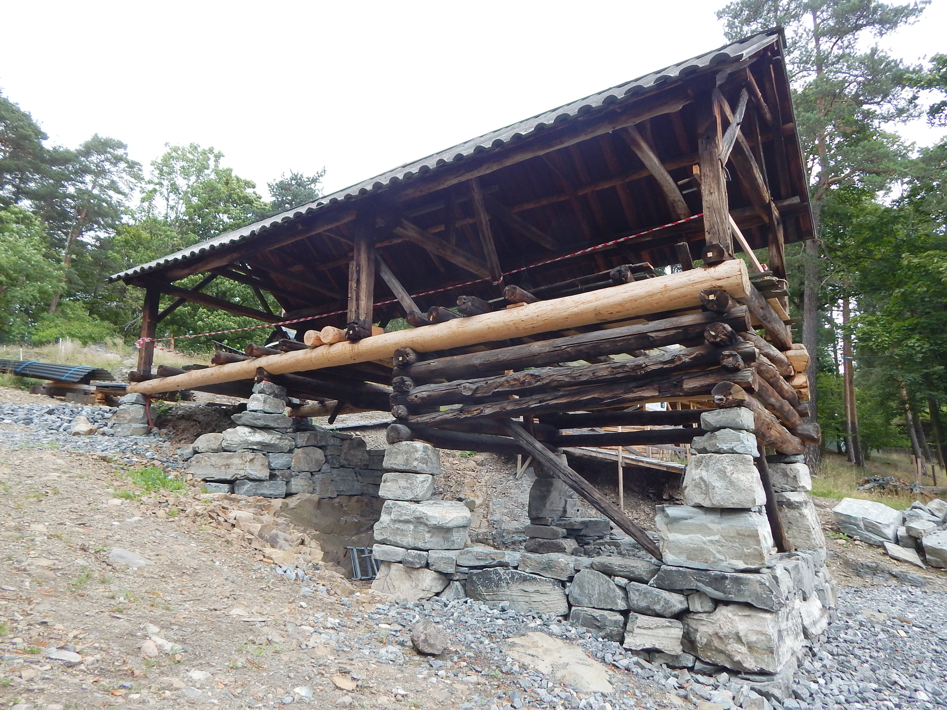 Oppgangssag fra Åkra (NF61) på Norsk Folkemuseum